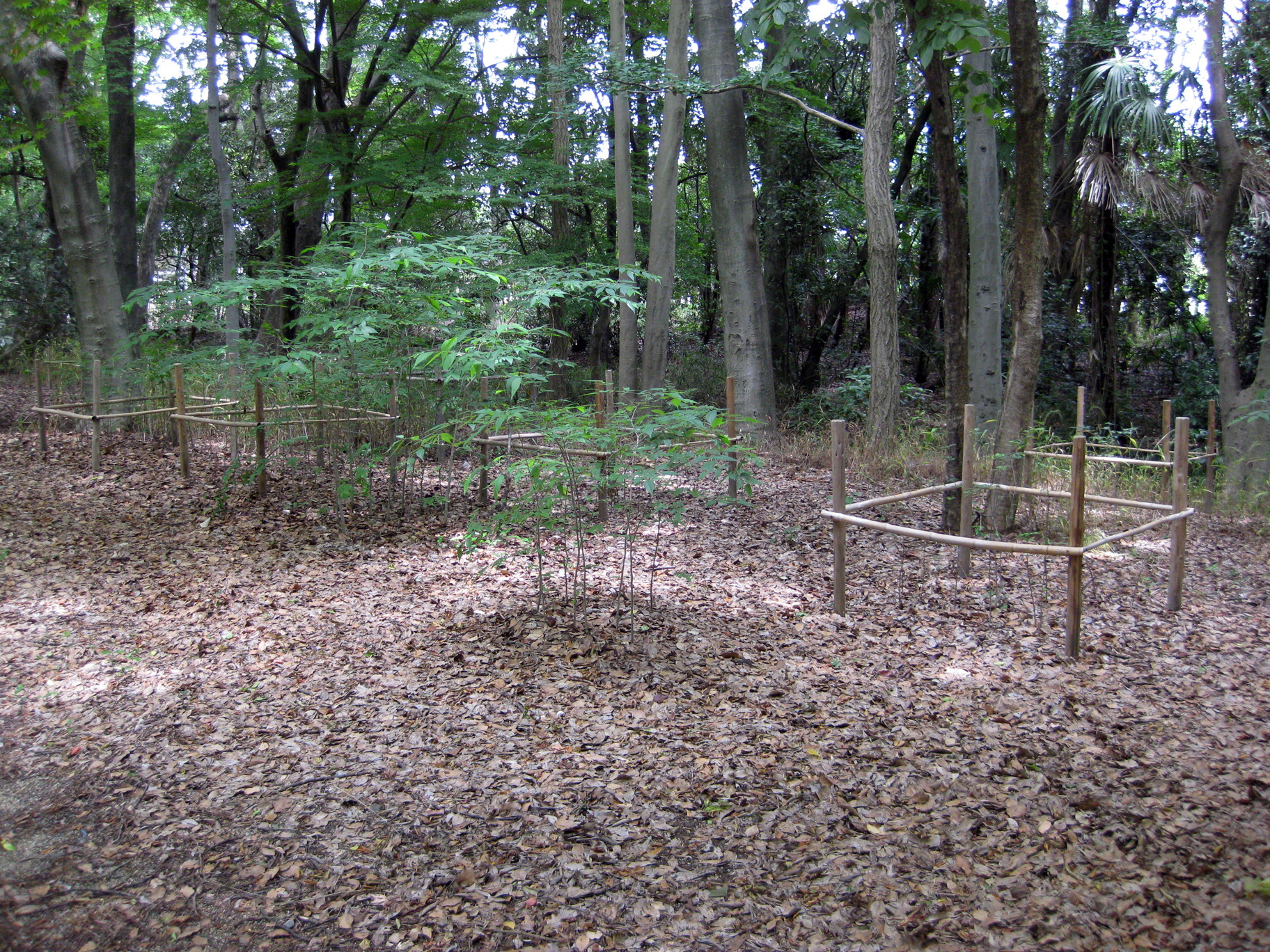 Tadasu_no_mori ("糺の森") in Shimogamo Jinja ("賀茂御祖神社（下鴨神社）"), Kyoto Pref. Japan.